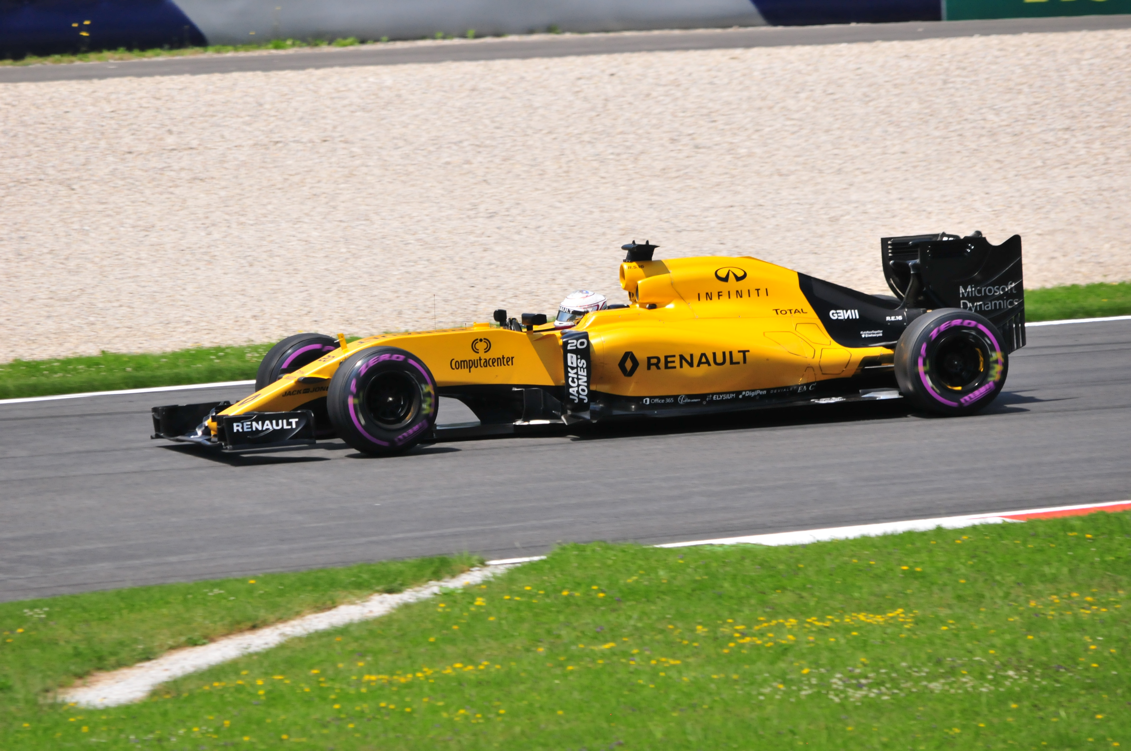 Renault Sport F1 Team #20 Kevin Magnussen